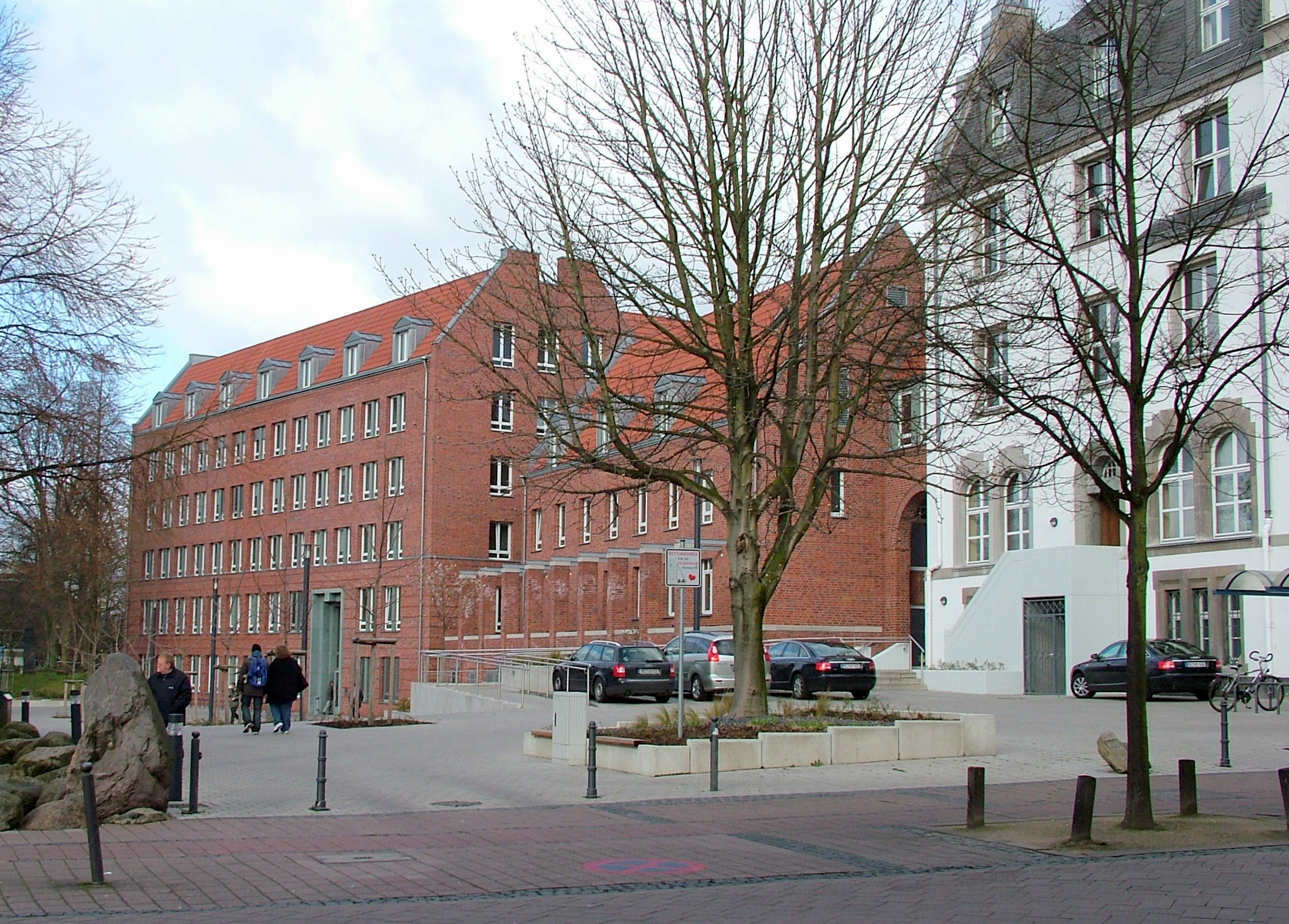 Südseite Anbau Rathaus ("Neues Rathaus"), Gladbeck. Seit Oktober 2006